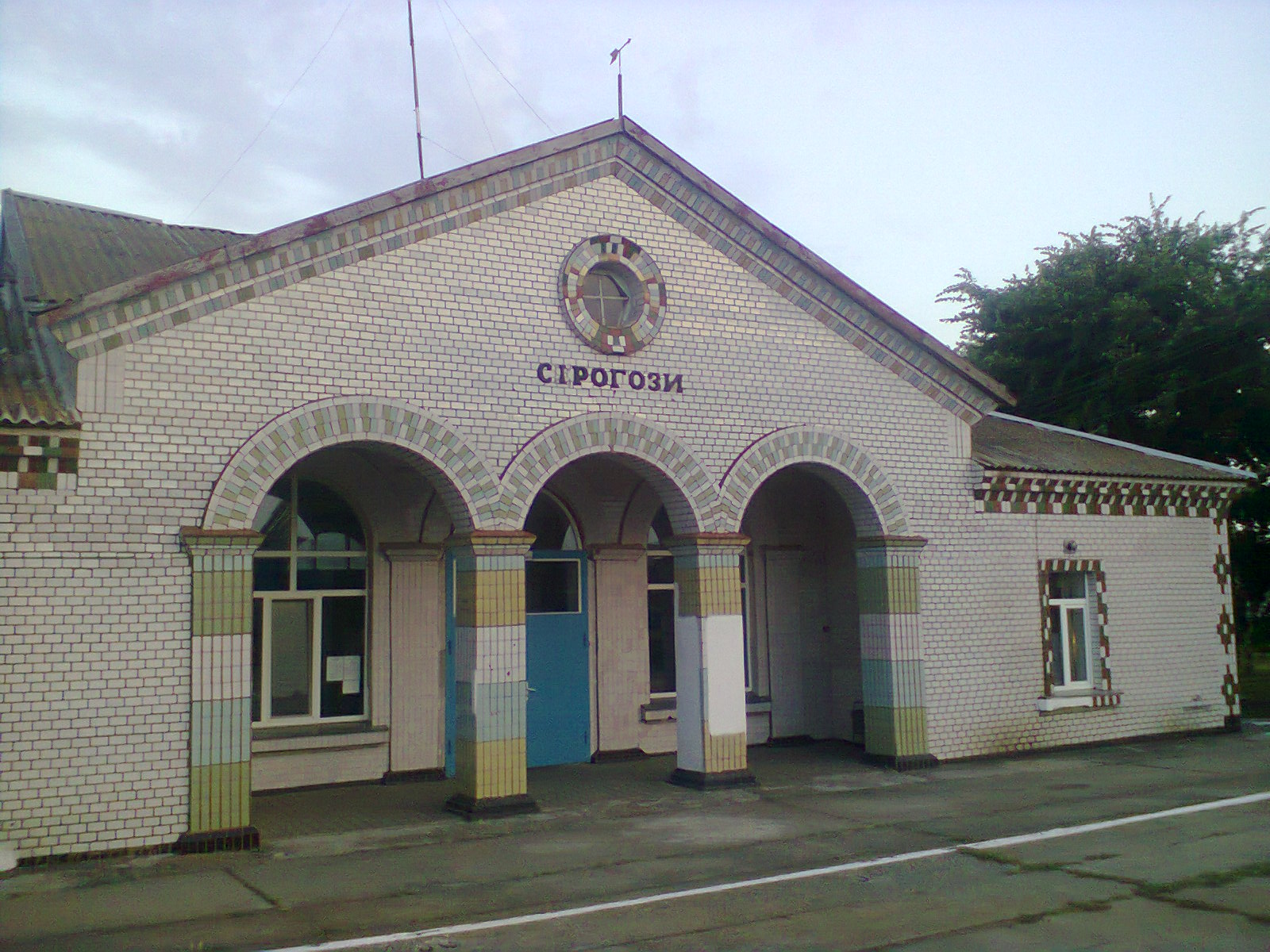 Адміністративна будівля та зала очікування залізничної станції.